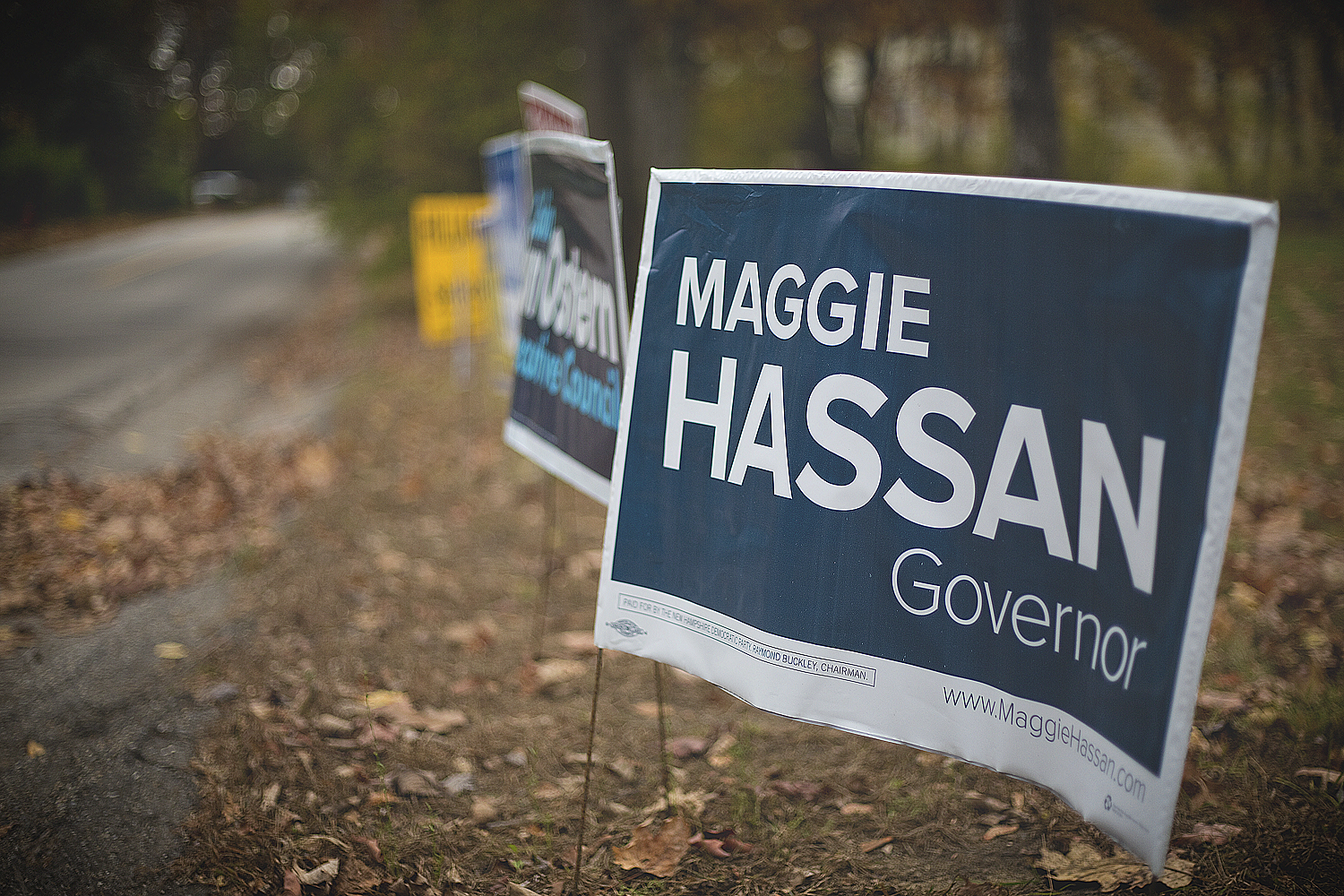 Template:Einer der vielen Wahlschilder während der "Mid-Term-Election". Hier in Franklin, N.H./USA.